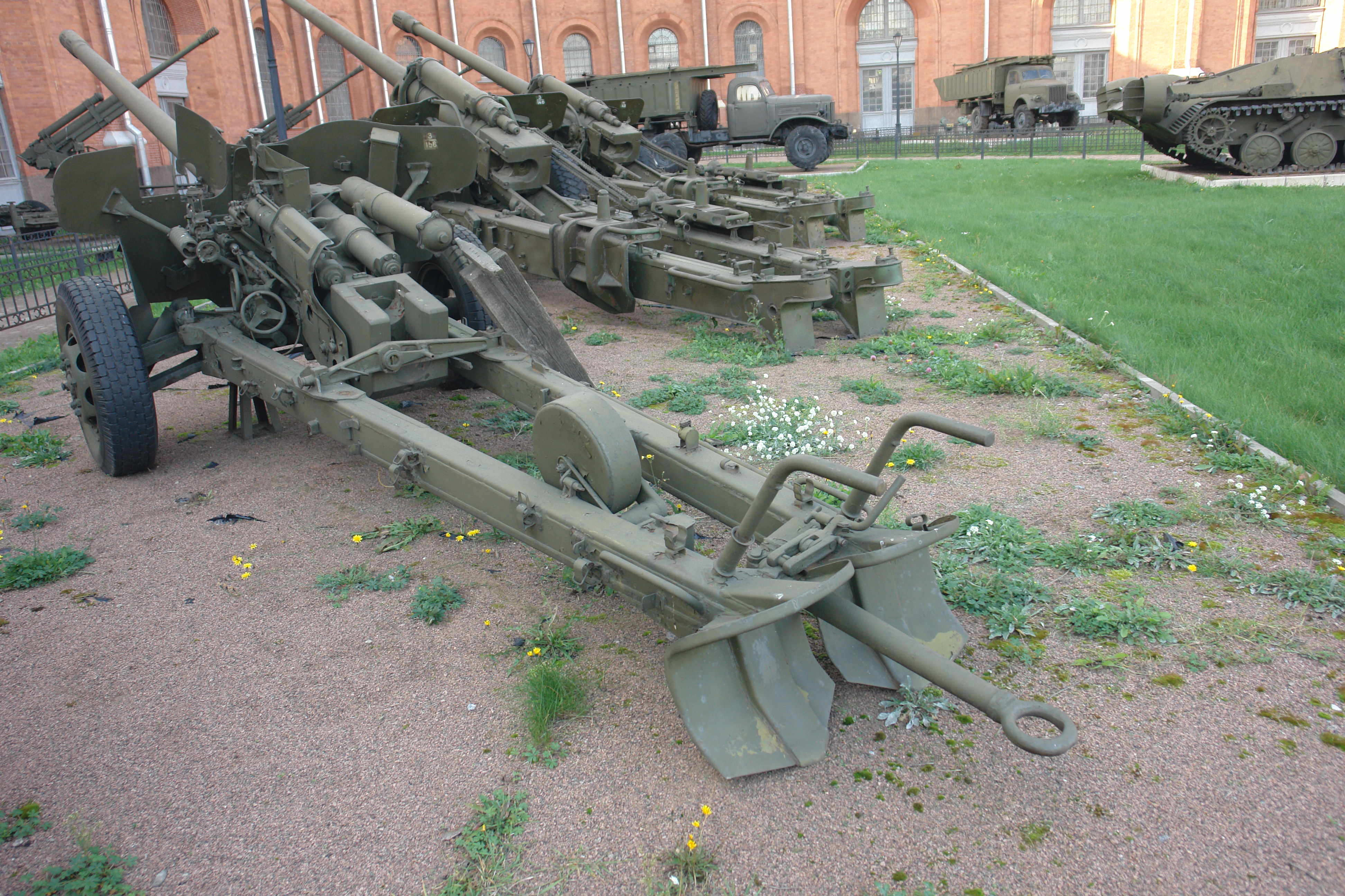 100-мм ПРОТИВОТАНКОВАЯ ПУШКА МТ-12(2А29) ПРИНЯТА НА ВООРУЖЕНИЕ В 1968 г. ГЛАВНЫЙ КОНСТРУКТОР Г.И.ЛУКЬЯНЧЕНКО. ДАЛЬНОСТЬ, М: СТРЕЛЬБЫ-8200, ПРЯМОГО ВЫСТРЕЛА - 1880. СКОРОСТРЕЛЬНОСТЬ - ДО 14 ВЫСТР/МИН МАССА ОРУДИЯ-3100. РАСЧЕТ 7 человек Военно-исторический музей артиллерии, инженерных войск и войск связи, Санкт-Петербург.